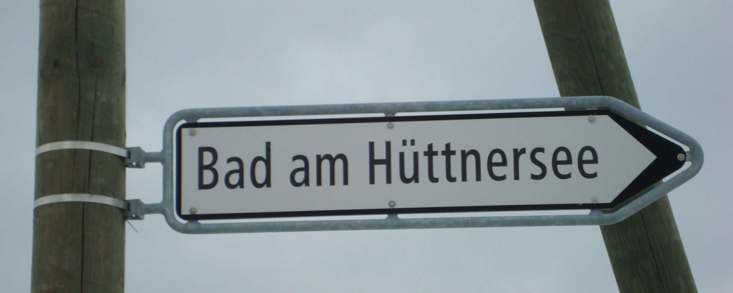 Wegweiser zum Bad am Hüttnersee, Gemeinde Hütten, Kanton Zürich, Schweiz (Standort: an der Kreuzung Hüttnerstrasse / Bellenstrasse, Samstagern, Gemeinde Richterswil)